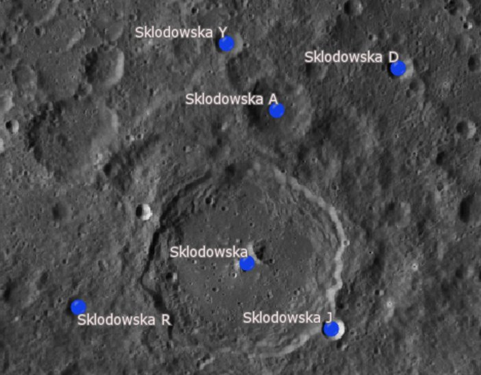 Cráter lunar Sklodowska. Cráteres satélite